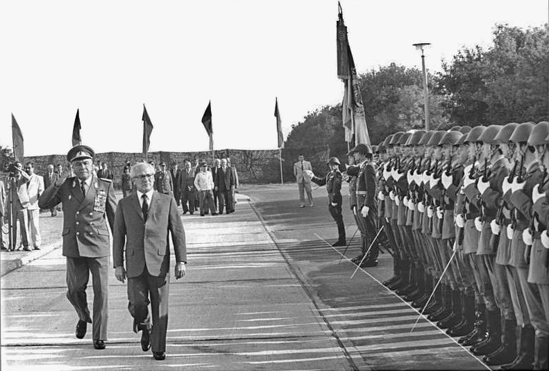 DDR, NVA-Truppenbesuch, Honecker ADN-ZB Link 29.8.85 DDR: Truppenbesuch-Der Generalsekretär des ZK der SED und Vorsitzende des Staatsrates der DDR, Erich Honecker, Vorsitzender des Nationalen Verteidigungsrates der DDR, besuchte die Luftstreitkräfte-Luftverteidigung der Nationalen Volksarmee. Begrüßt durch Armeegeneral Heinz Hoffmann (l.), Mitglied des Politbüros des ZK der SED und Minister für Nationale Verteidigung, schritt Erich Honecker eine Ehrenkompanie ab.